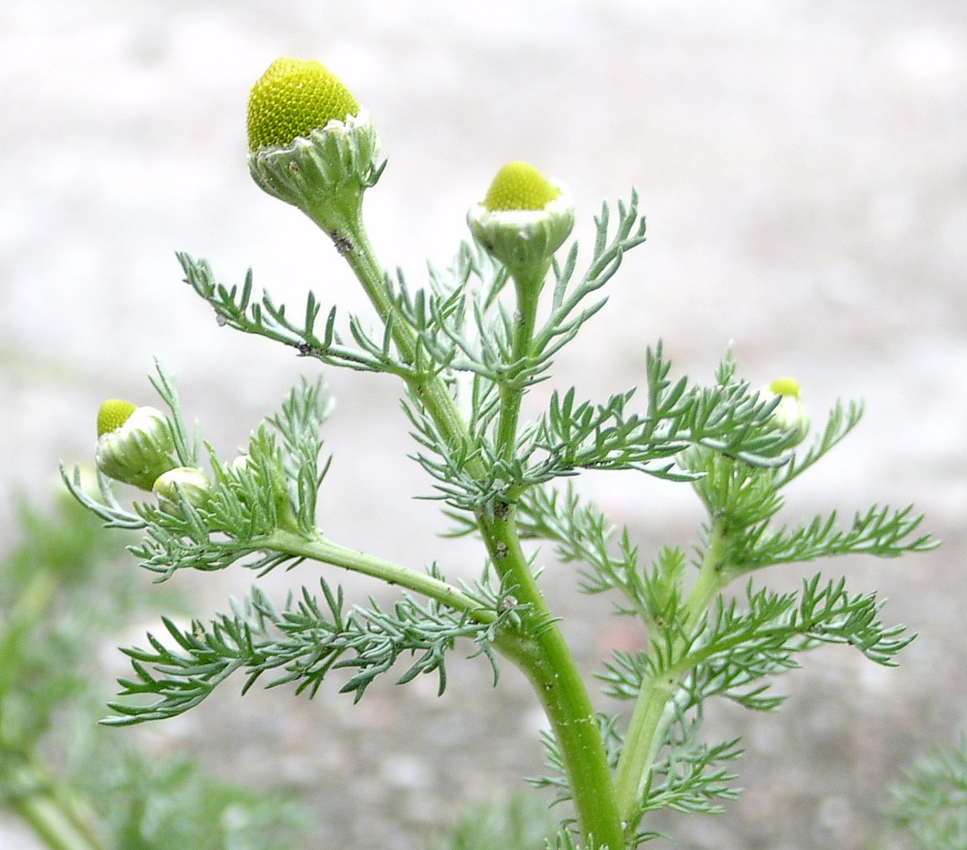 Chamomilla suaveolens, Gryfino, NW Poland